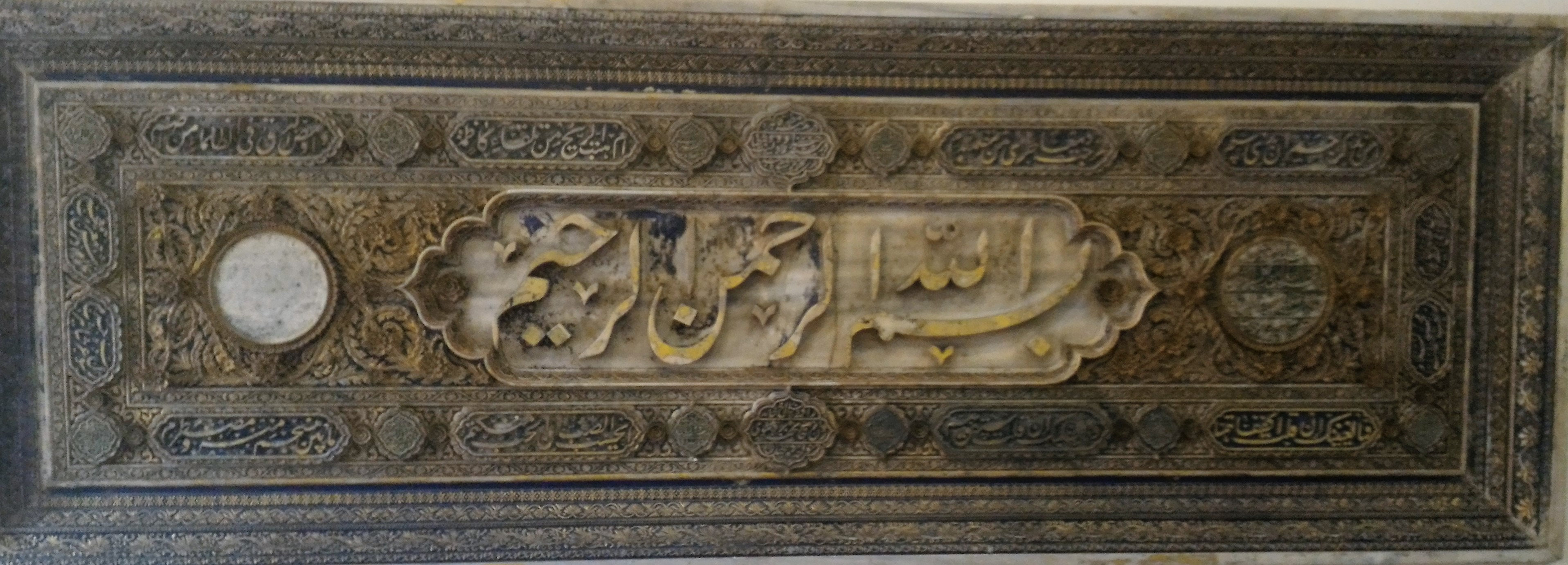 سنگ بسم الله در موزه آذربایجان تبریز.